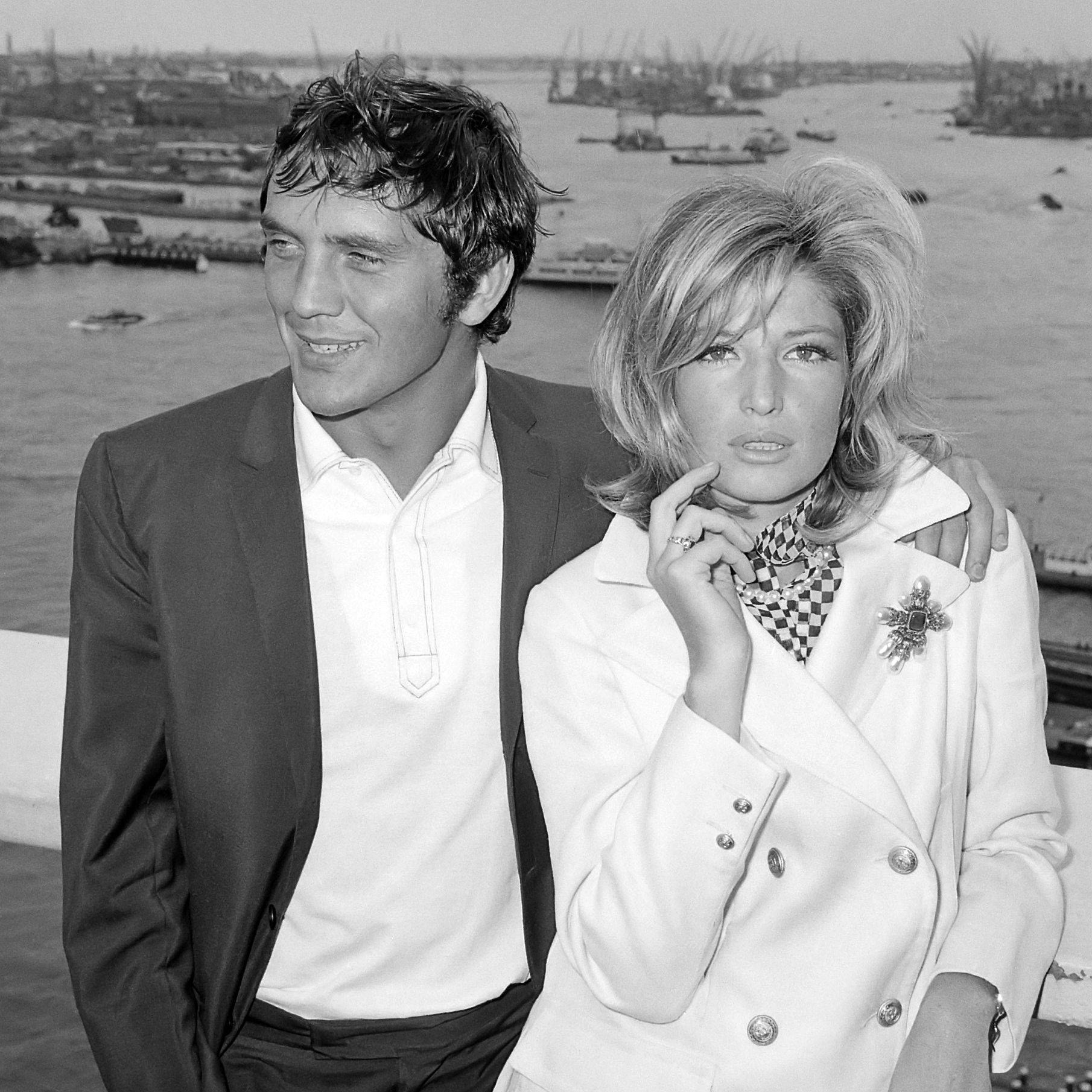 "Modesty Blaise" film van Amerikaan Joseph Losey. Filmopnamen te Amsterdam. Monica Vitti en tegenspeler Terence Stamp 12 juli 1965